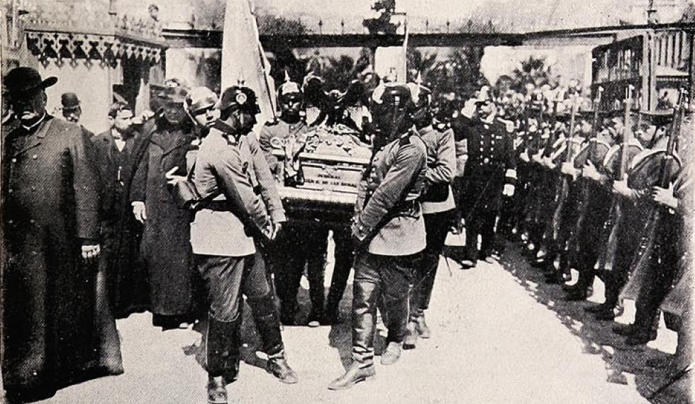 Repatriación de los restos del militar argentino Juan Gregorio Las Heras desde Chile a Argentina (1906)